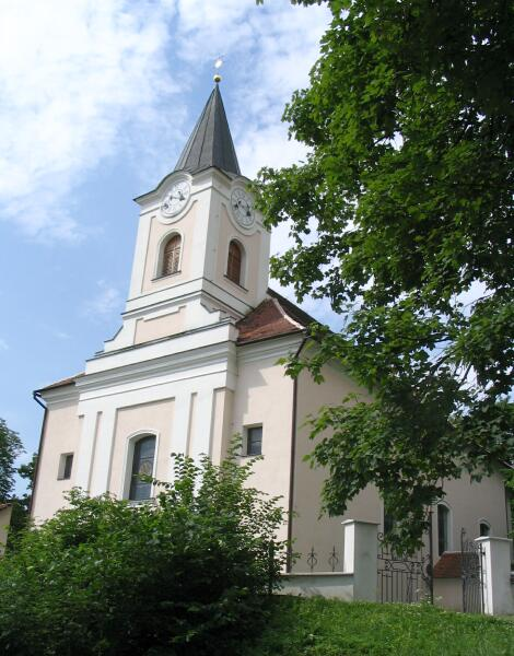 Pohled na kostel sv. Marka v Knínicích u Boskovic (srpen 2005)